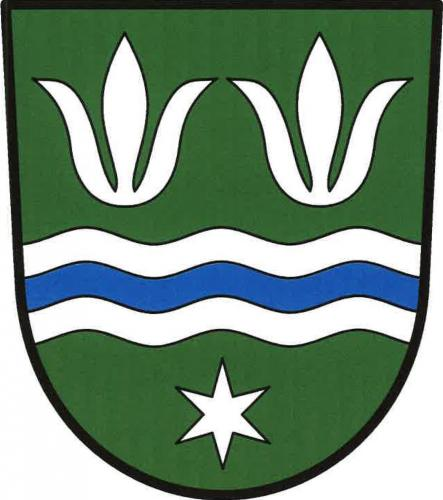 Číchov znak